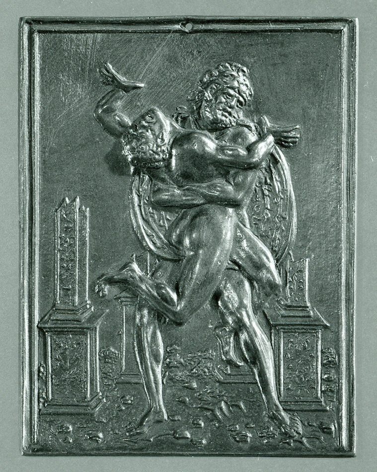 Plaquette; Plaquettes